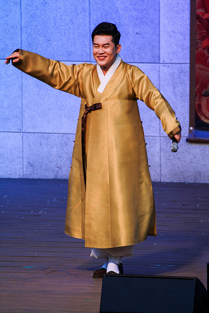 2017 04월 27일 고양 연등 문화 축제